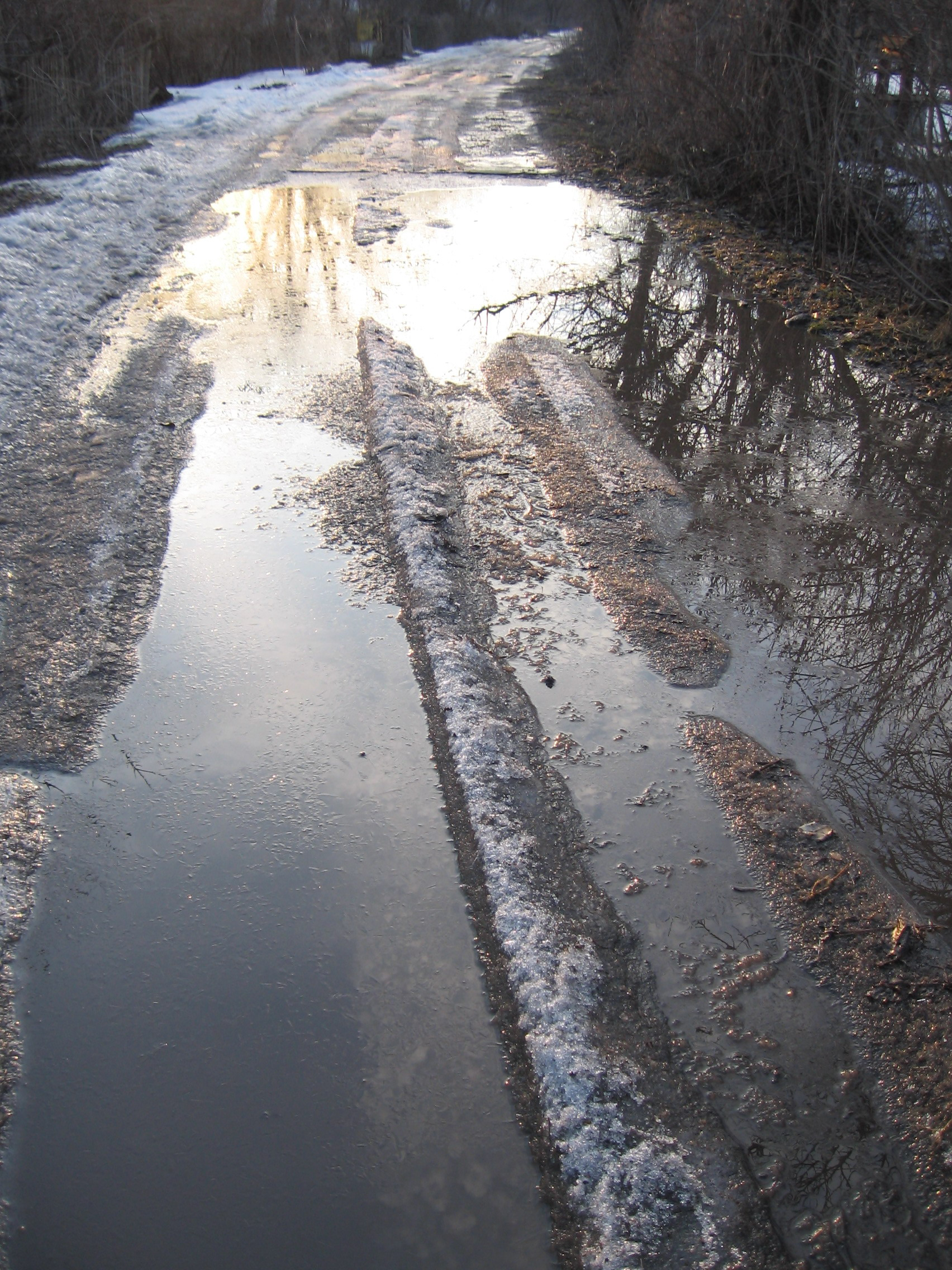 Калюжа.